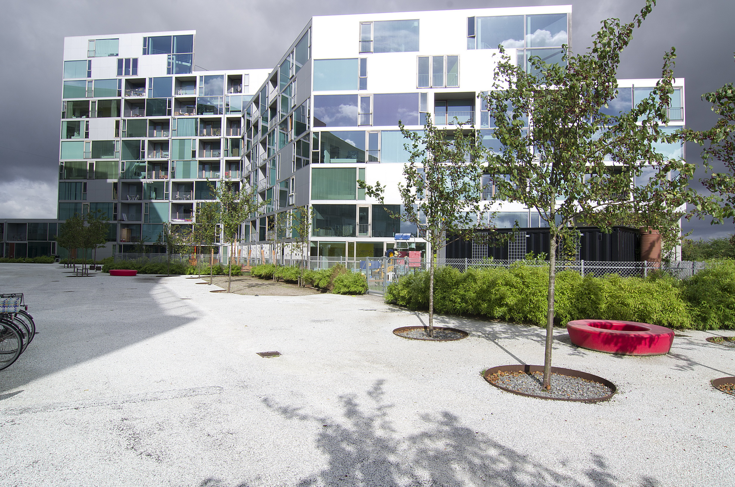 VM Houses in Copenhagen, Denmark